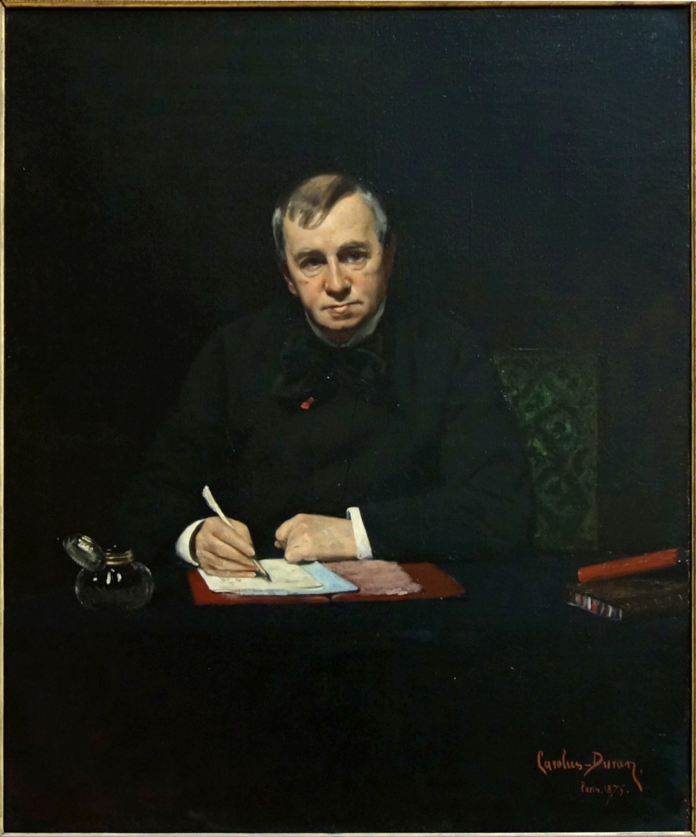 Emile de Girardin au Palais des beaux-arts de Lille.